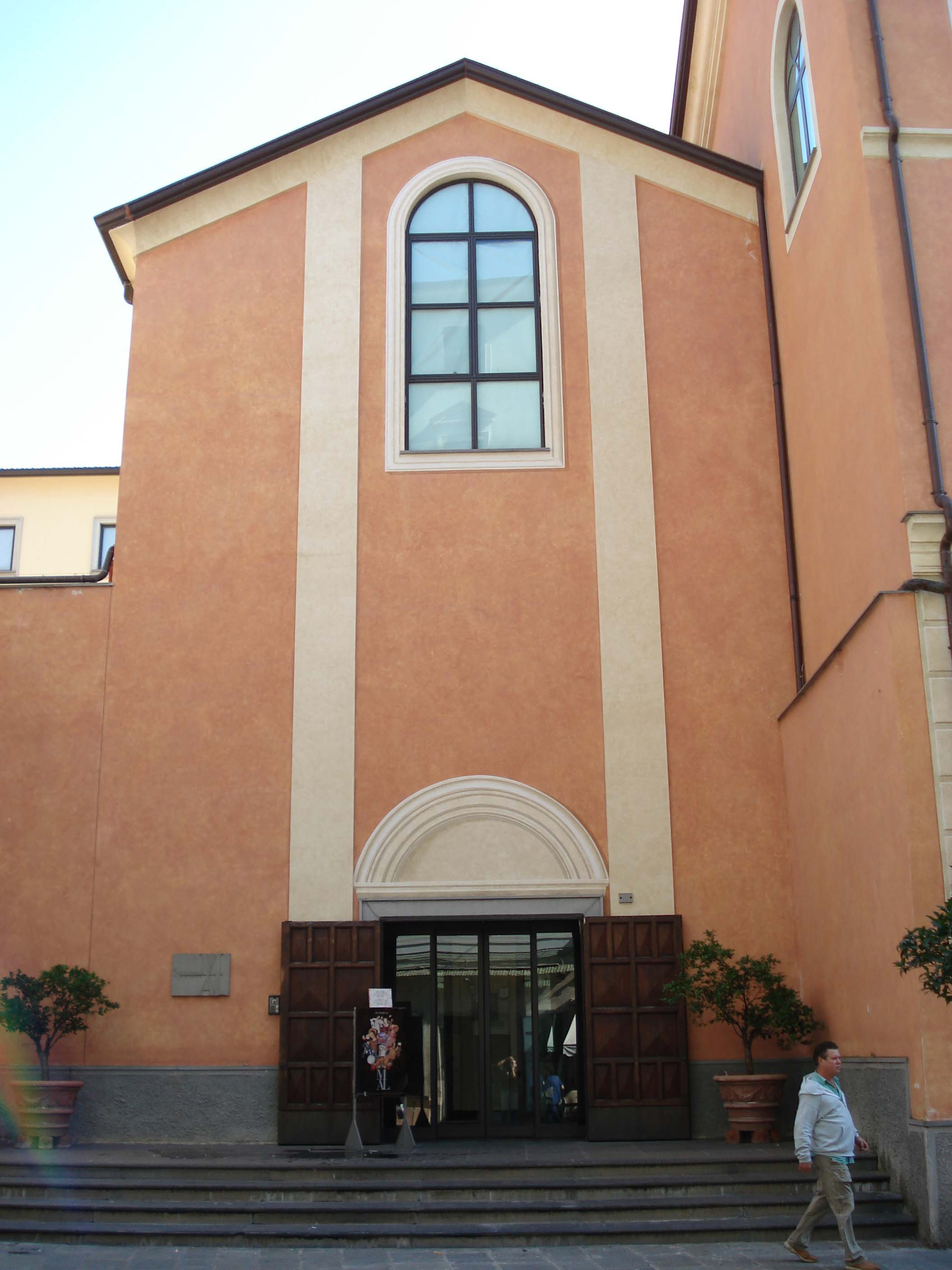 Museo "Amedeo Lia" - La Spezia - Italia.